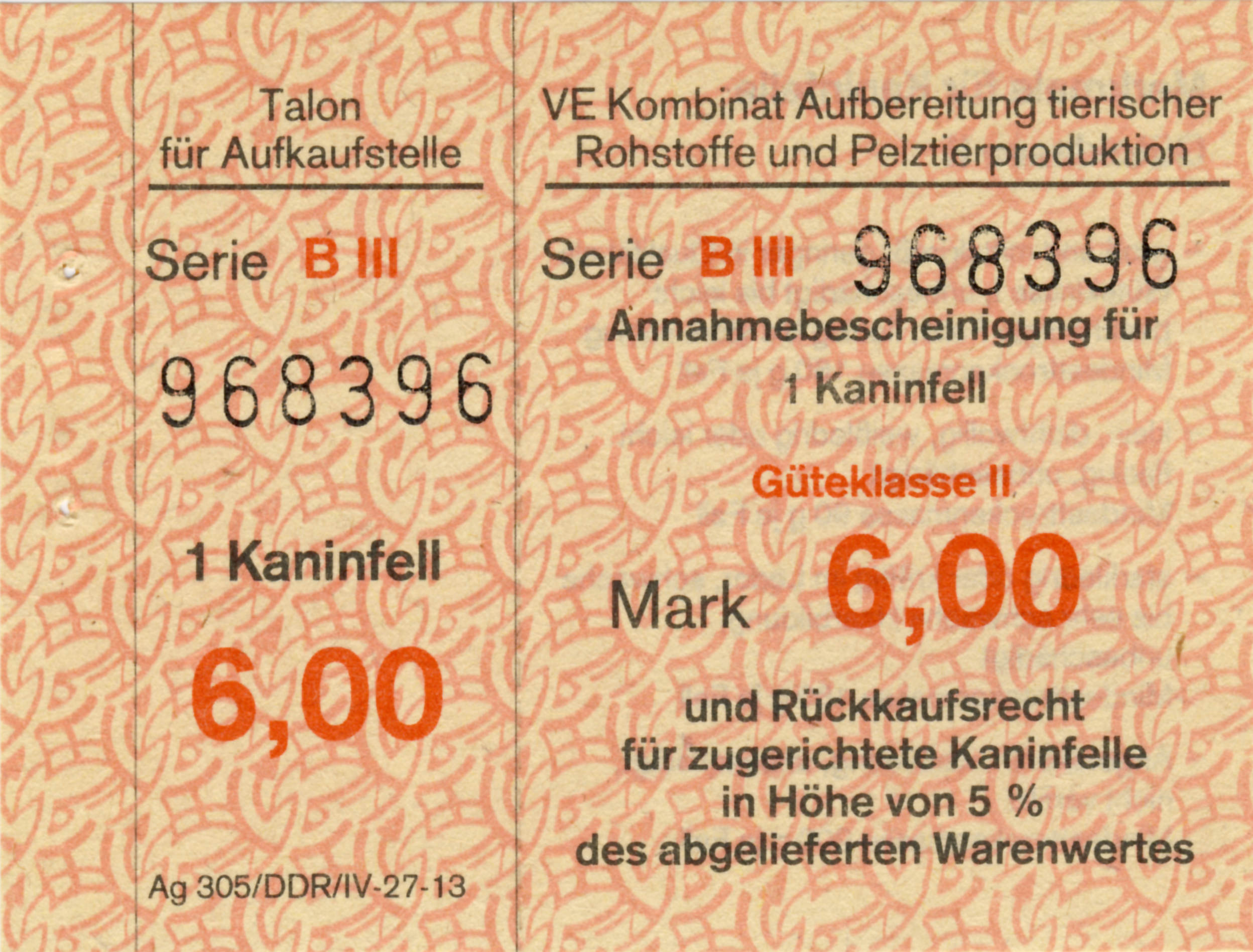 Annahmebescheinigung für ein Kaninfell. Um einen Anreiz zum Abliefern der Rohfelle zu schaffen, gewährte man den Einliefern zusätzlich zum Ankaufspreis die Möglichkeit, einen gewissen Prozentsatz an zugerichteten, eventuell auch geschorenen und/oder gefärbten Fellen zurück zu kaufen, die sogenannte Prämienware. Die Einkaufsstelle für Felle lag ab etwa 1950 bei der VEAB, in die die RAVAG, die Rauchwaren-Versteigerungs-Gesellschaft, aufgegangen war. Diese schon in der Zeit des Nationalsozialismus existierende Organisation ließ sich einfach in das sozialistische System integrieren, da sie vorher schon die Fellsammlung zentral betrieben hatte. Die „Lieferungsbestimmungen“ vom 1. Oktober 1938 weisen folgenden Vorgänger: „Fellsa, Fellsammelstelle der RAVAG Rauchwaren-Versteigerungs-Gesellschaft Grabs & Wiesemann als Beauftragte der Reichsfachgruppe Pelztierzüchter e. V. Berlin, Leipzig C1, Ladestraße IV“ Siehe auch das Sortierlager der Leipziger VEAB